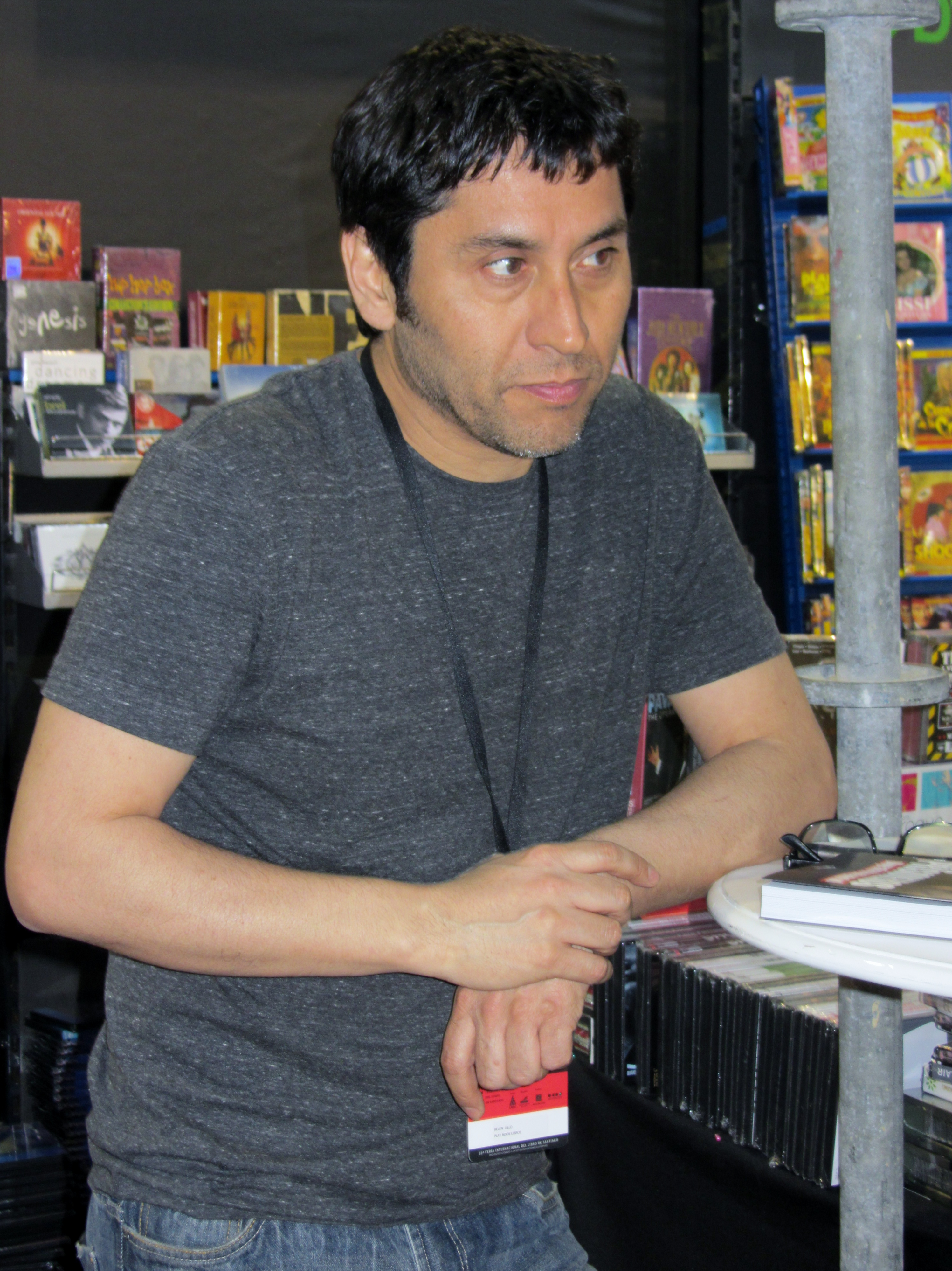 El guitarrista, cantante y compositor chileno de rock Claudio Narea en la Feria Internacional del Libro de Santiago 2015